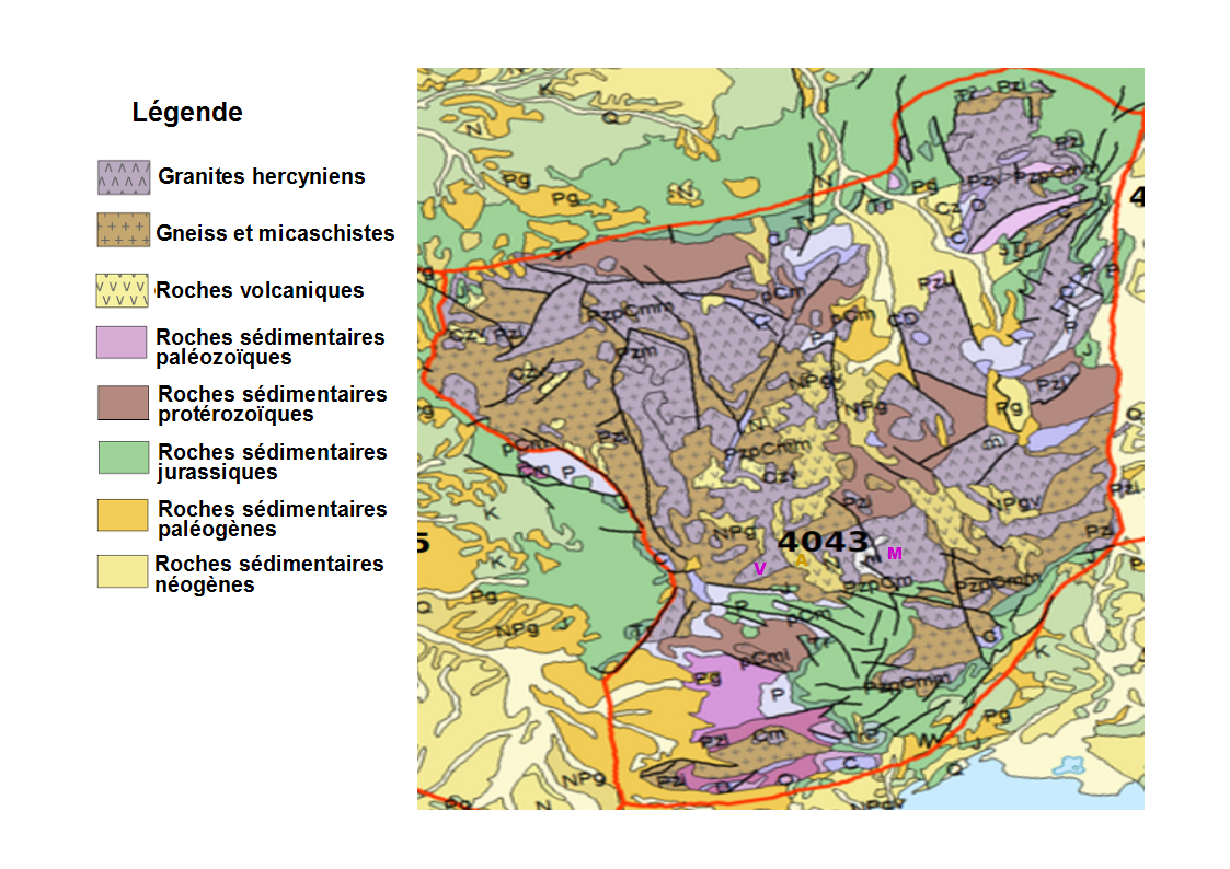 Carte géologique du sud du Massif central